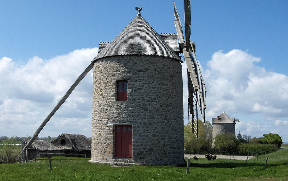 Les Moulins de la Saline et de la Colimassière à Cherrueix.